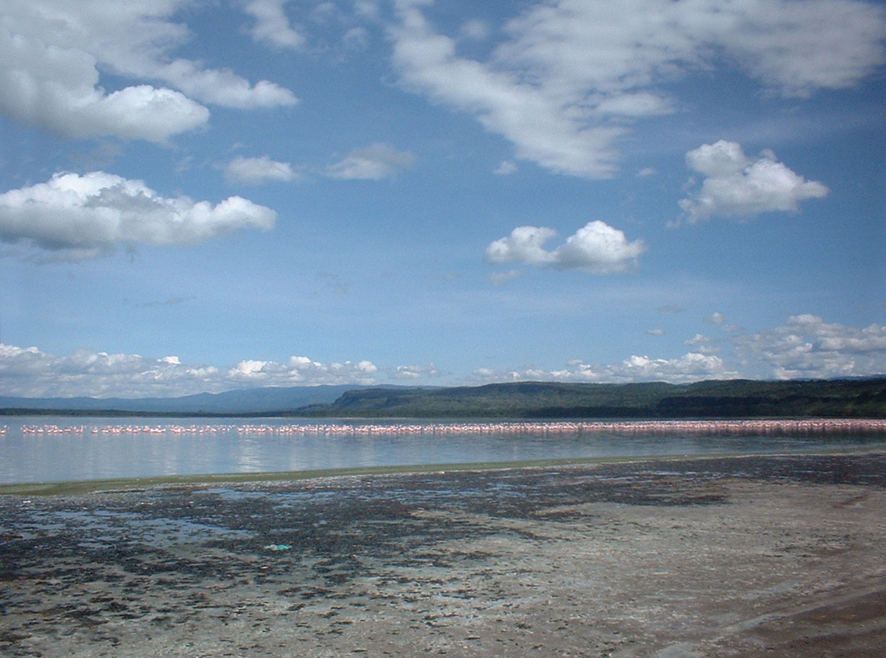 Flamingos in Lake Nakuru, Kenia, in Mei 2003. Foto door mij gemaakt.